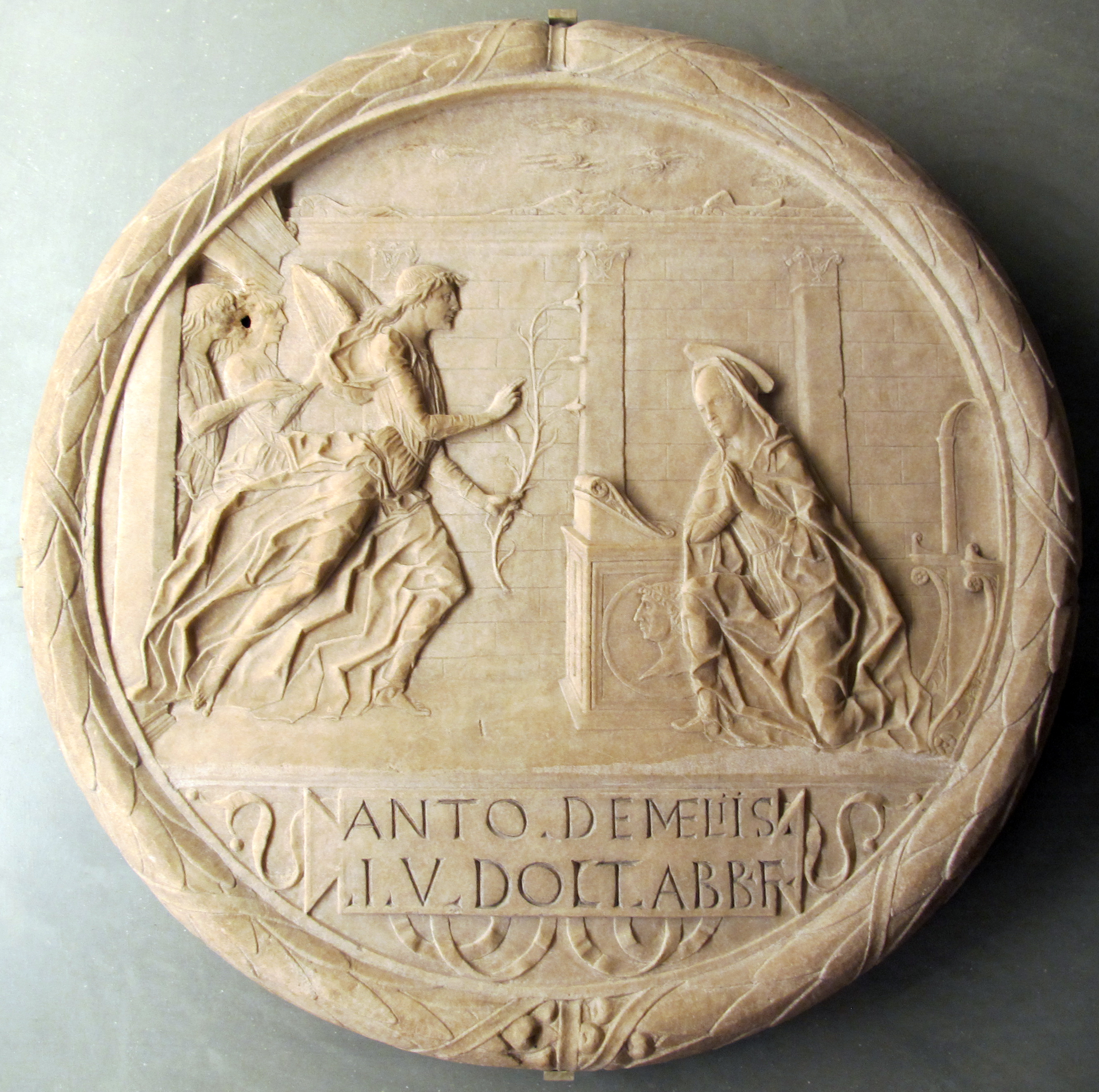 Scultura italiana, Louvre